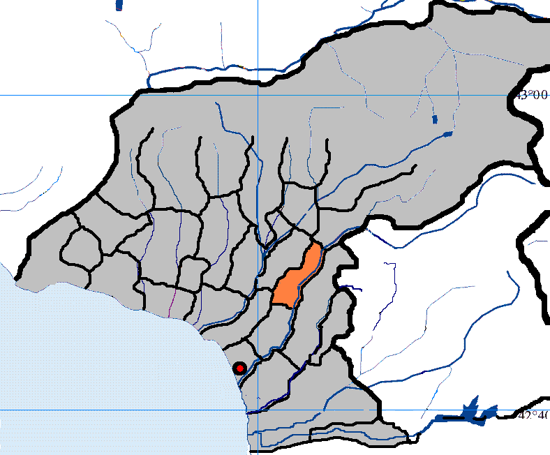 Сельская администрация Акуаскиа (Очамчырский район)